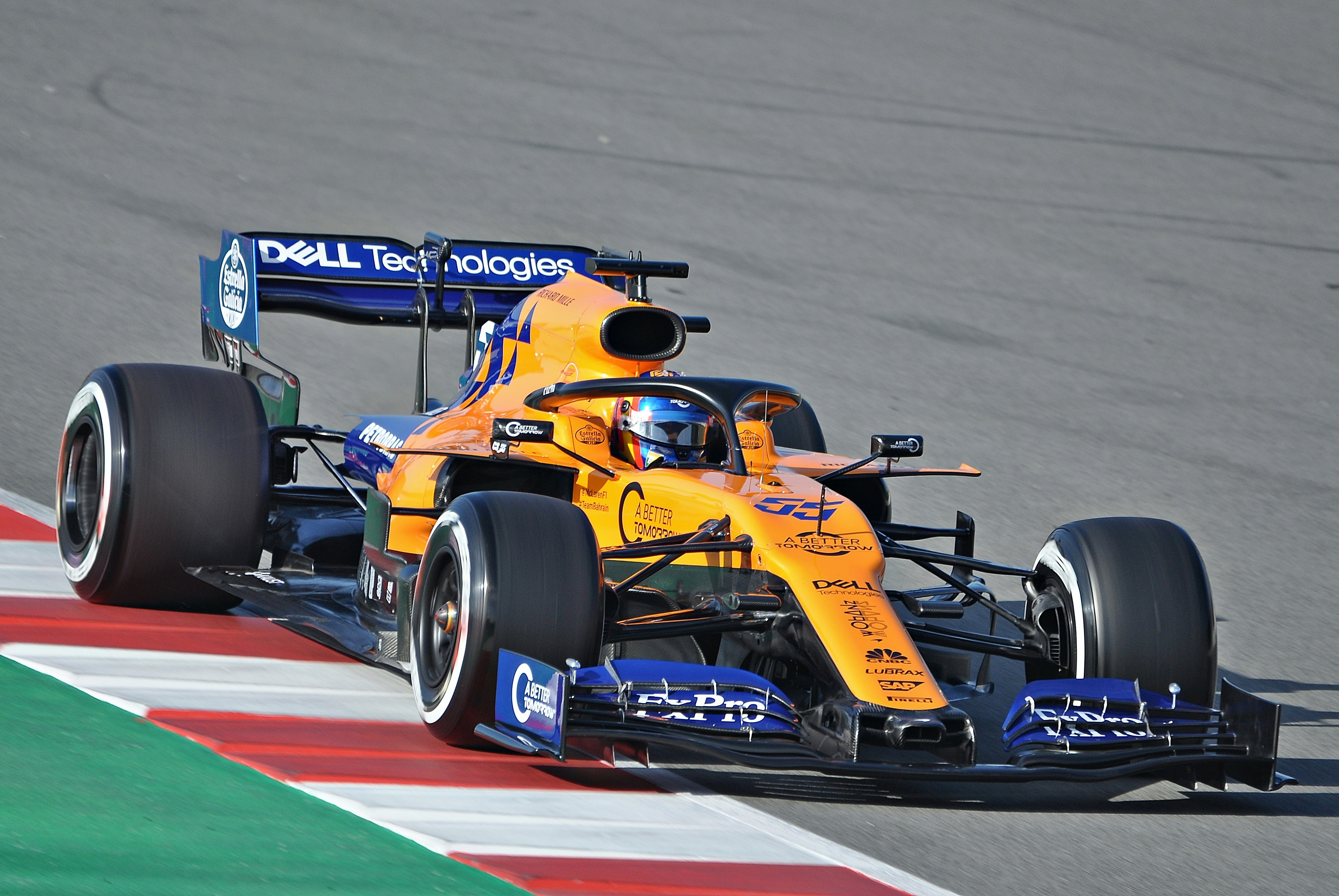 Tests Days-Circuito Catalunya